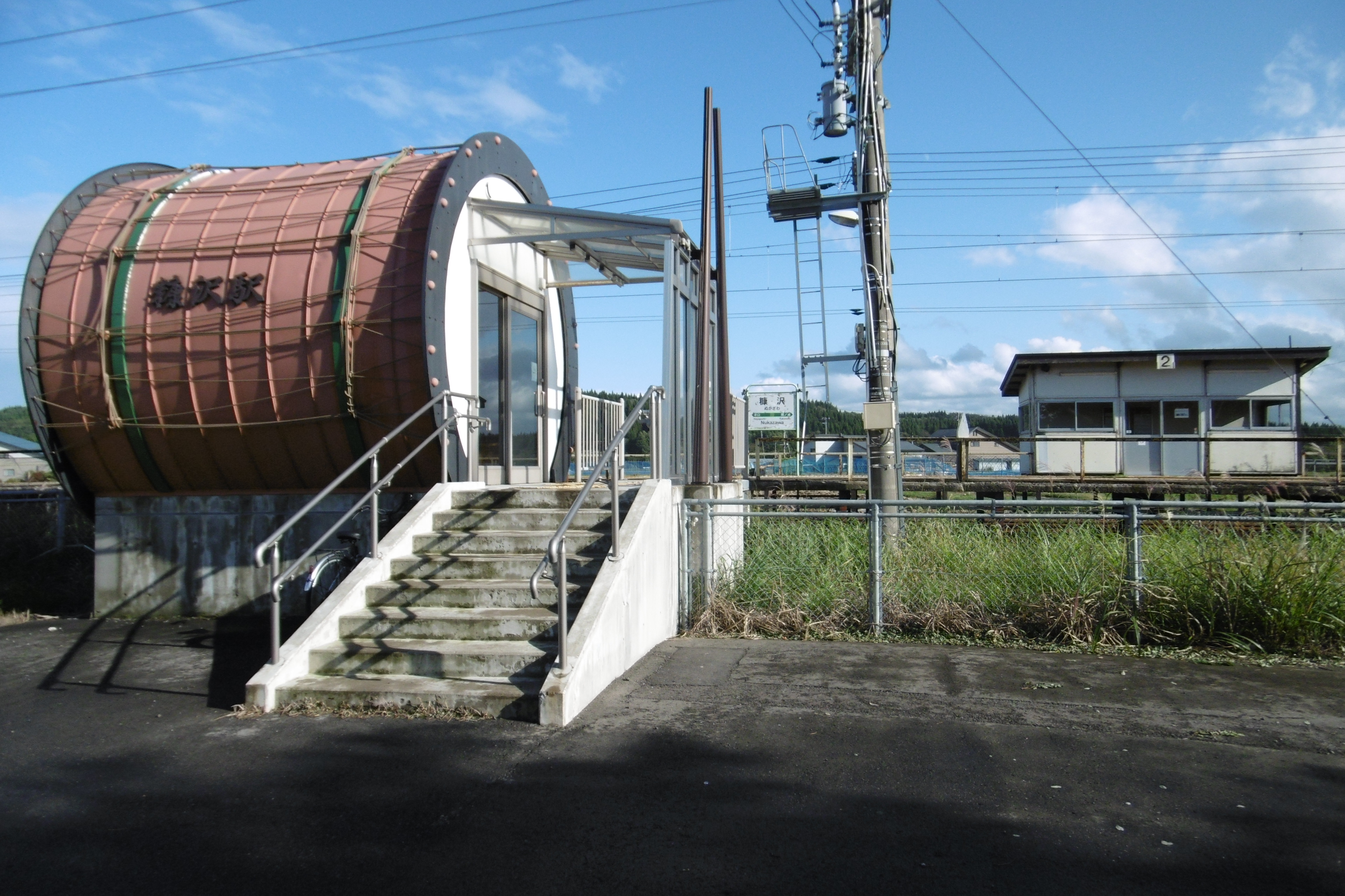 奥羽本線 糠沢駅